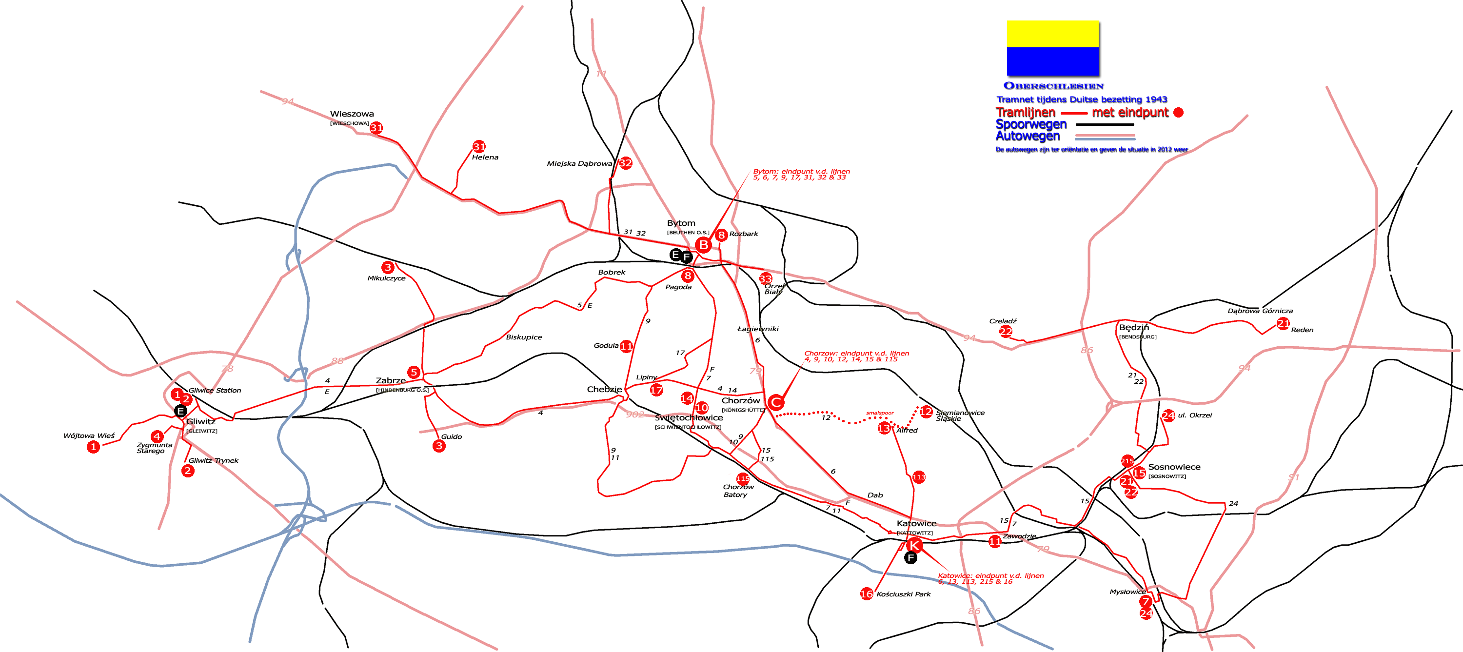 Tramnet Oberschlesien in 1943, tijdens de Duitse bezetting